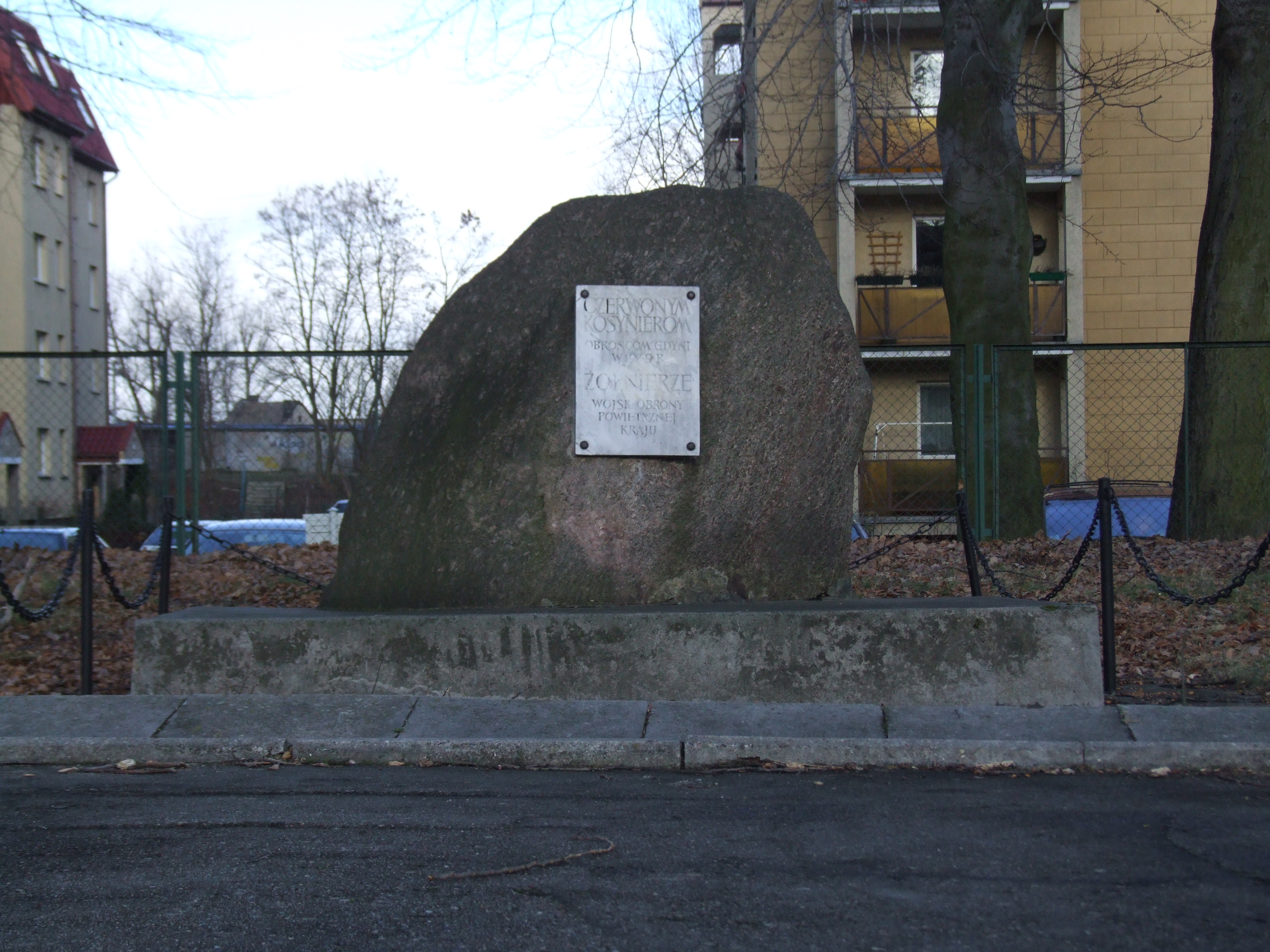 Pomnik Czerwonym Kosynierom, obrońcom Gdyni w 1939 r. w Gdyni